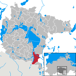 Lärz im Landkreis Müritz, Mecklenburg-Vorpommern